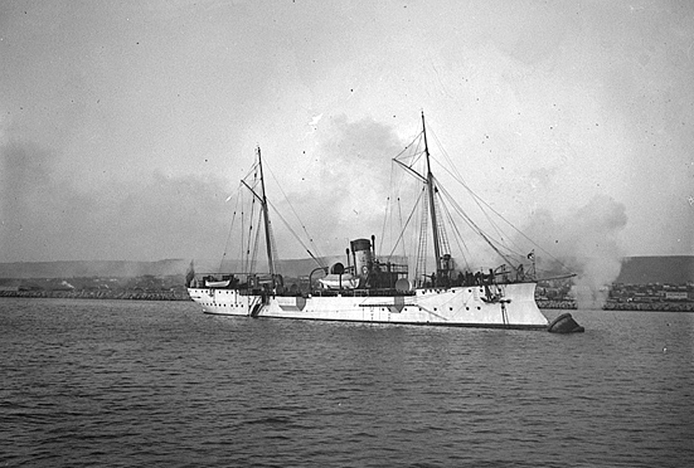 Болгарский крейсер Надежда.